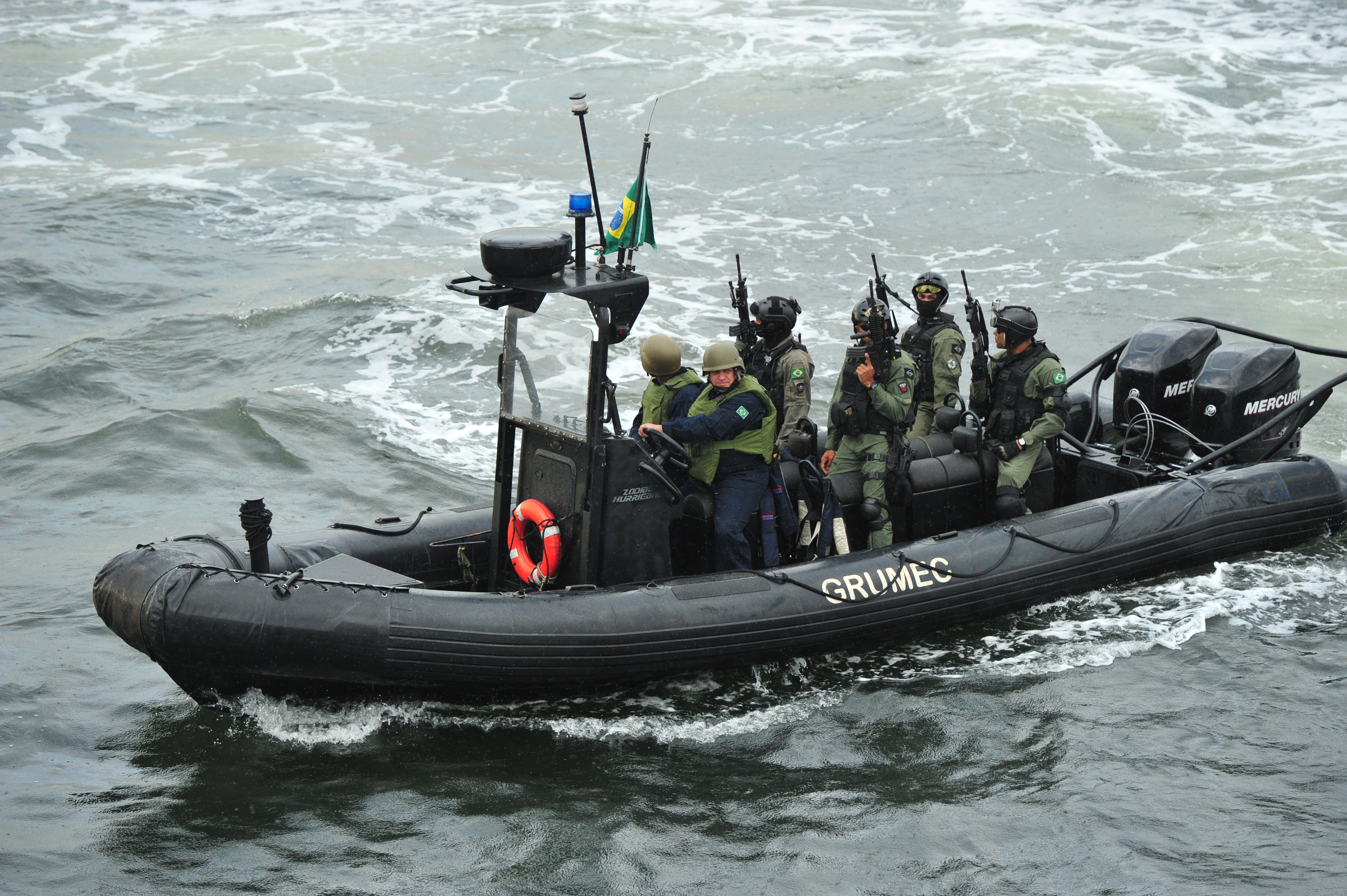 Treinamento realizado pelo GRUMEC (Grupamento de Mergulhadores de Combate) para a Copa das Confederações 2013 Arquivo liberado pela Marinha do Brasil através de projeto GLAM com Wiki Educação Brasil